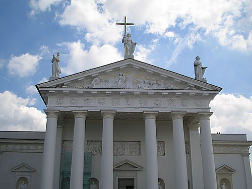 Αγάλματα μπροστά στα αετώματα του αγίου Στανισλάβ.